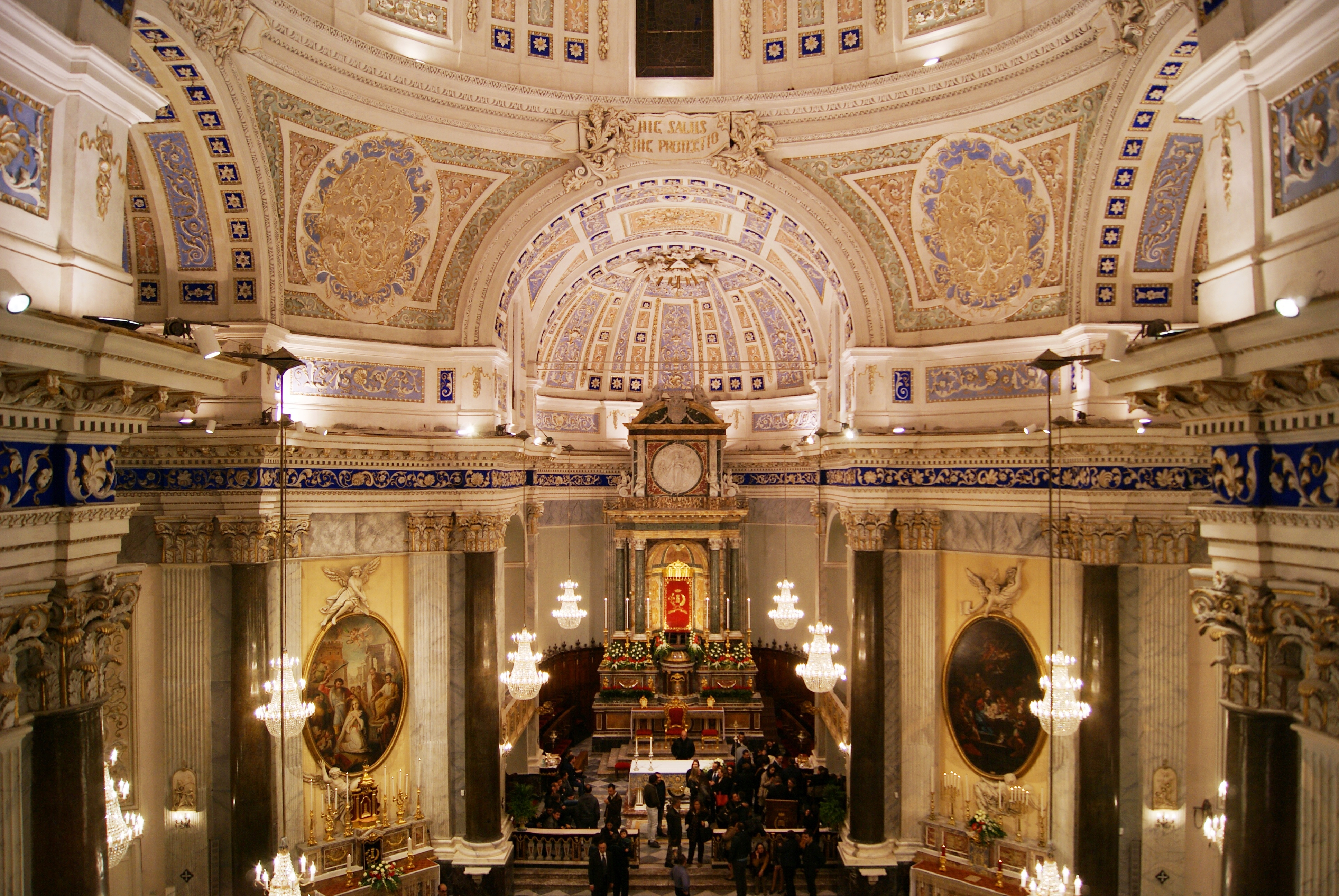 Interno della Chiesa di Santa Barbara - Paternò (Ct)